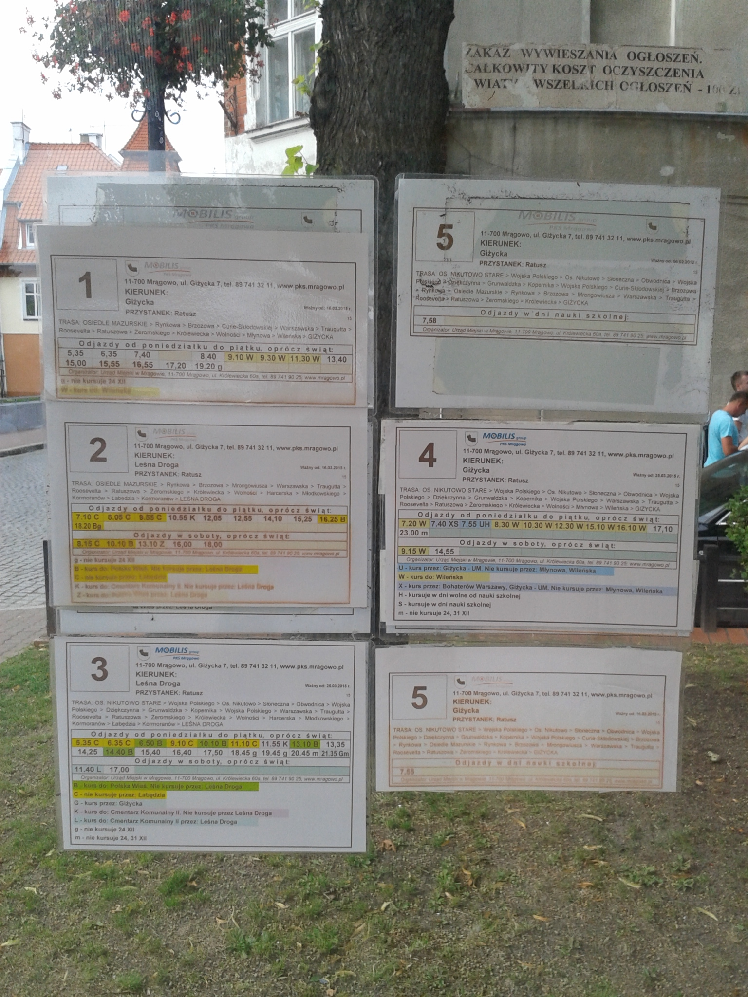 Rozkłady jazdy komunikacji miejskiej w Mrągowie